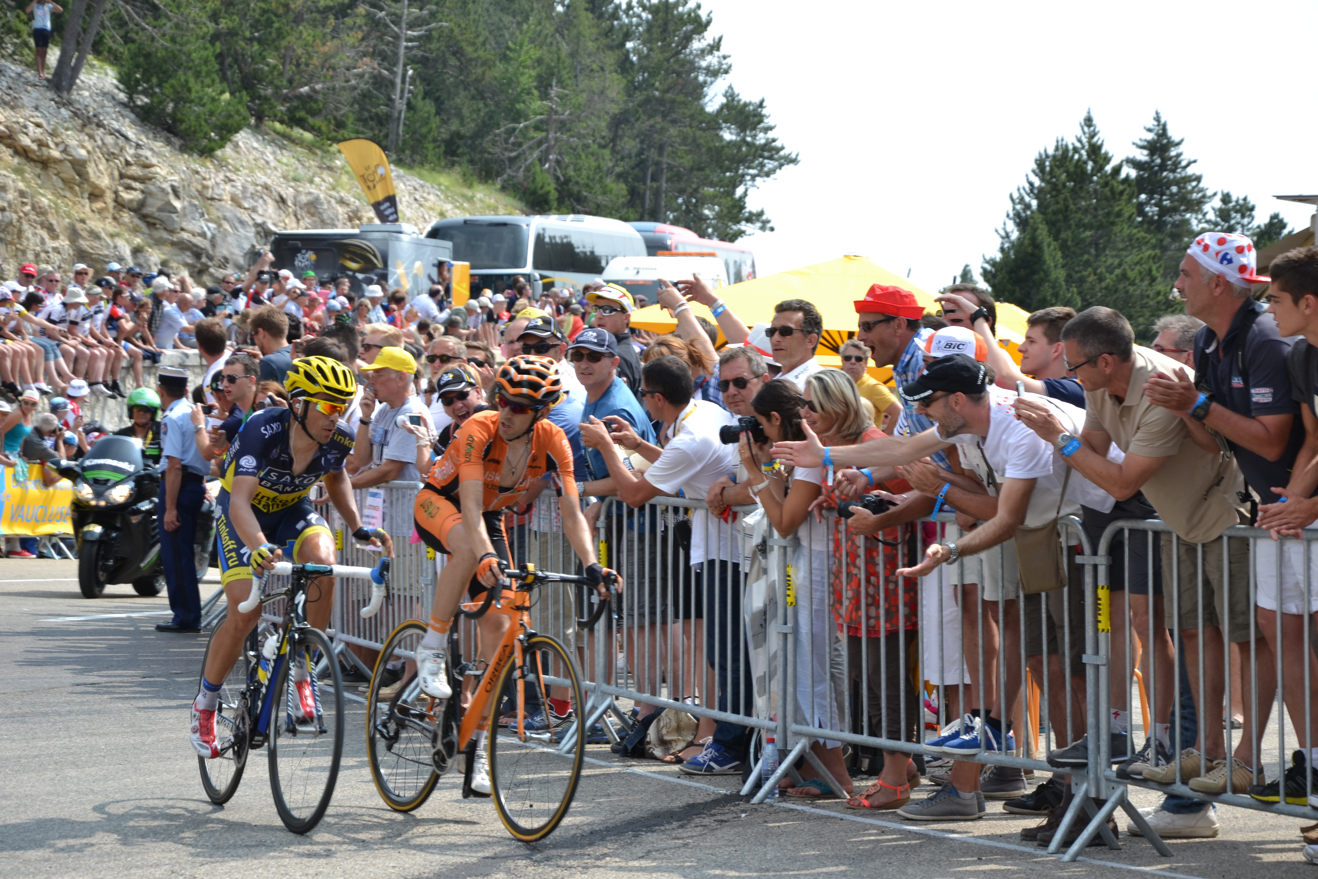 Mikel Nieve et Alberto Contador, au Chalet Reynard, Mont Ventoux, lors de la 15ème étape du Tour de France 2013